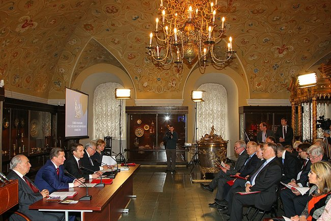 см. Российское историческое общество и Кремль предложили создавать wiki-учебник русской истории